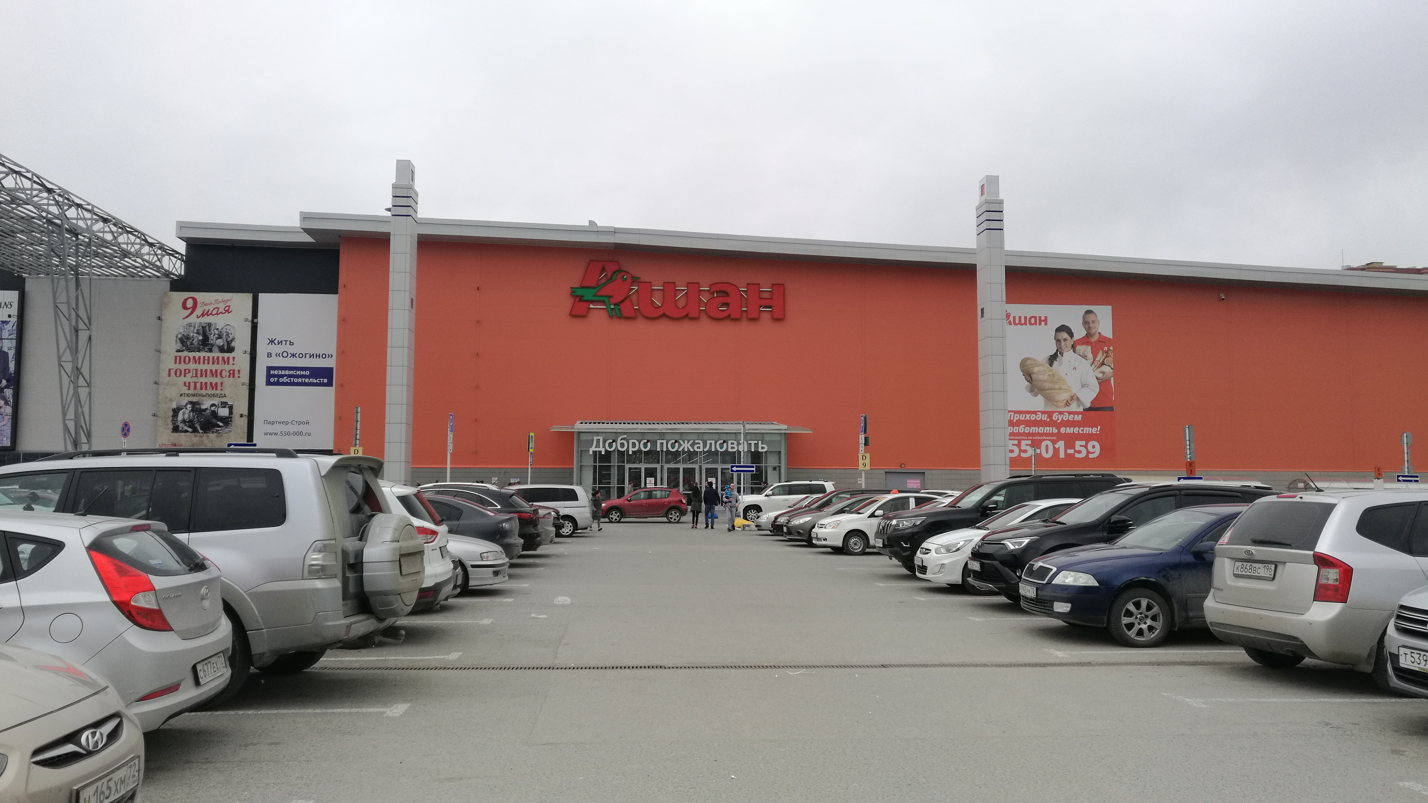 Aĉetcentro Kristall. Tjumeno, Rusio.